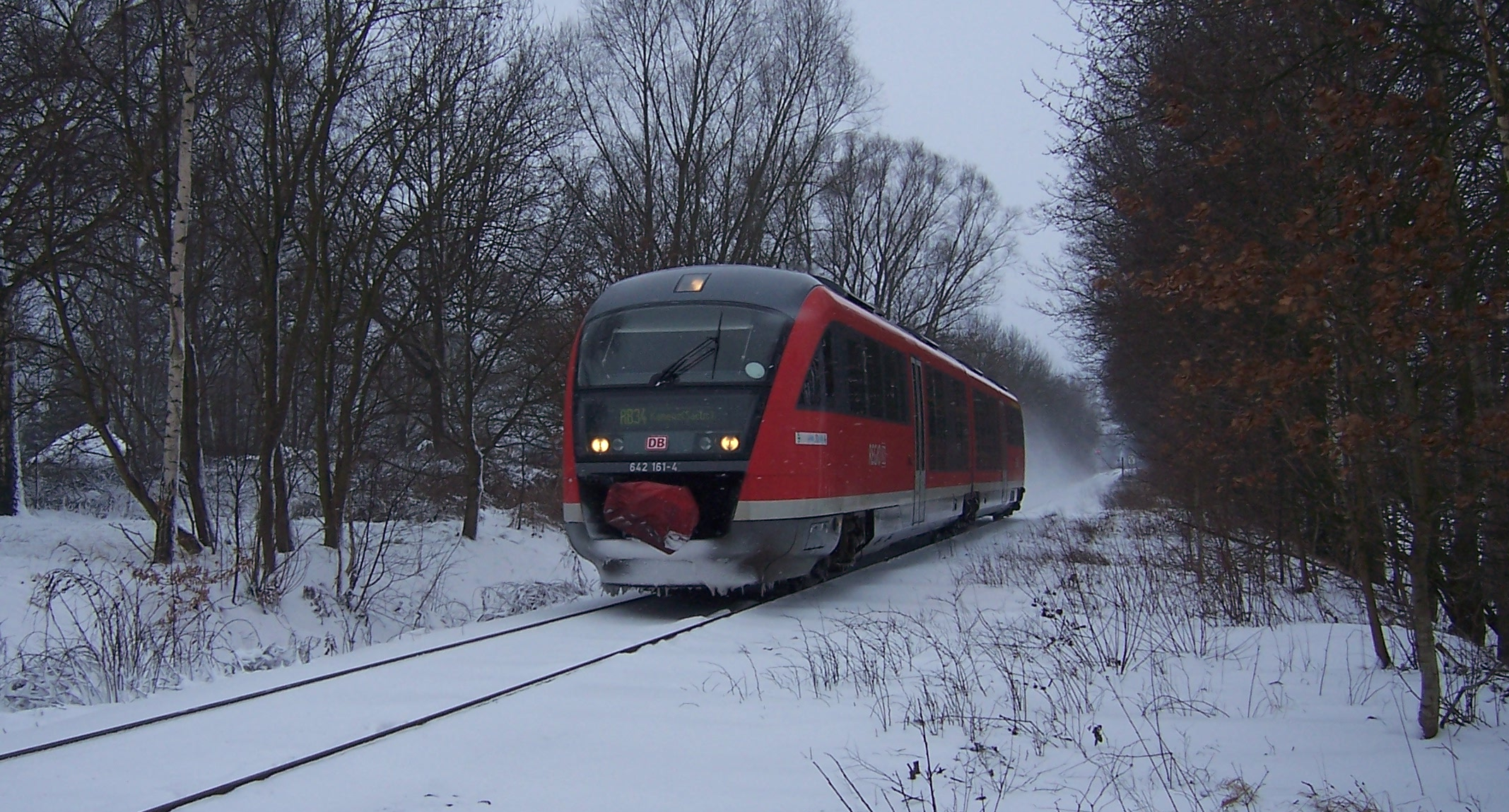 Siemens Desiro der DB Regio Südost kurz nach der Abfahrt vom Bahnhof Arnsdorf (Dresden) nach Kamenz (Sachs).